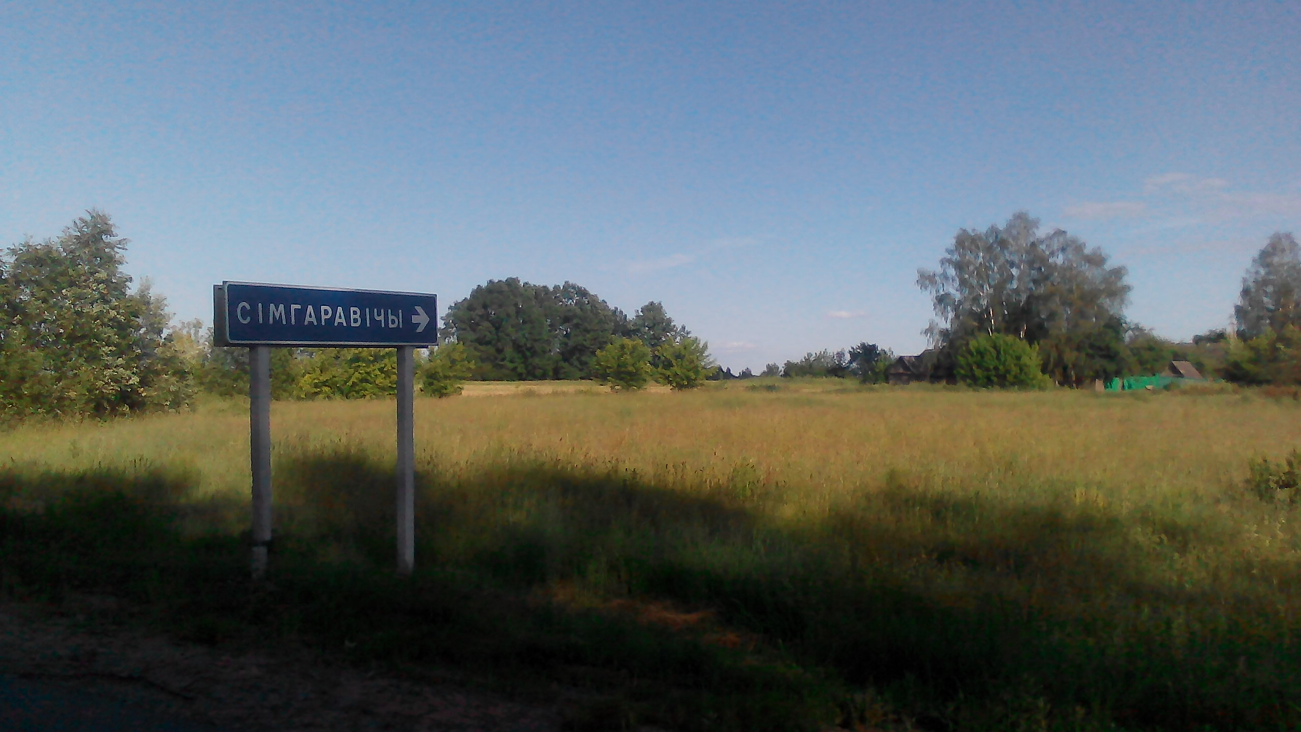 д.Симгоровичи Бобруйского района